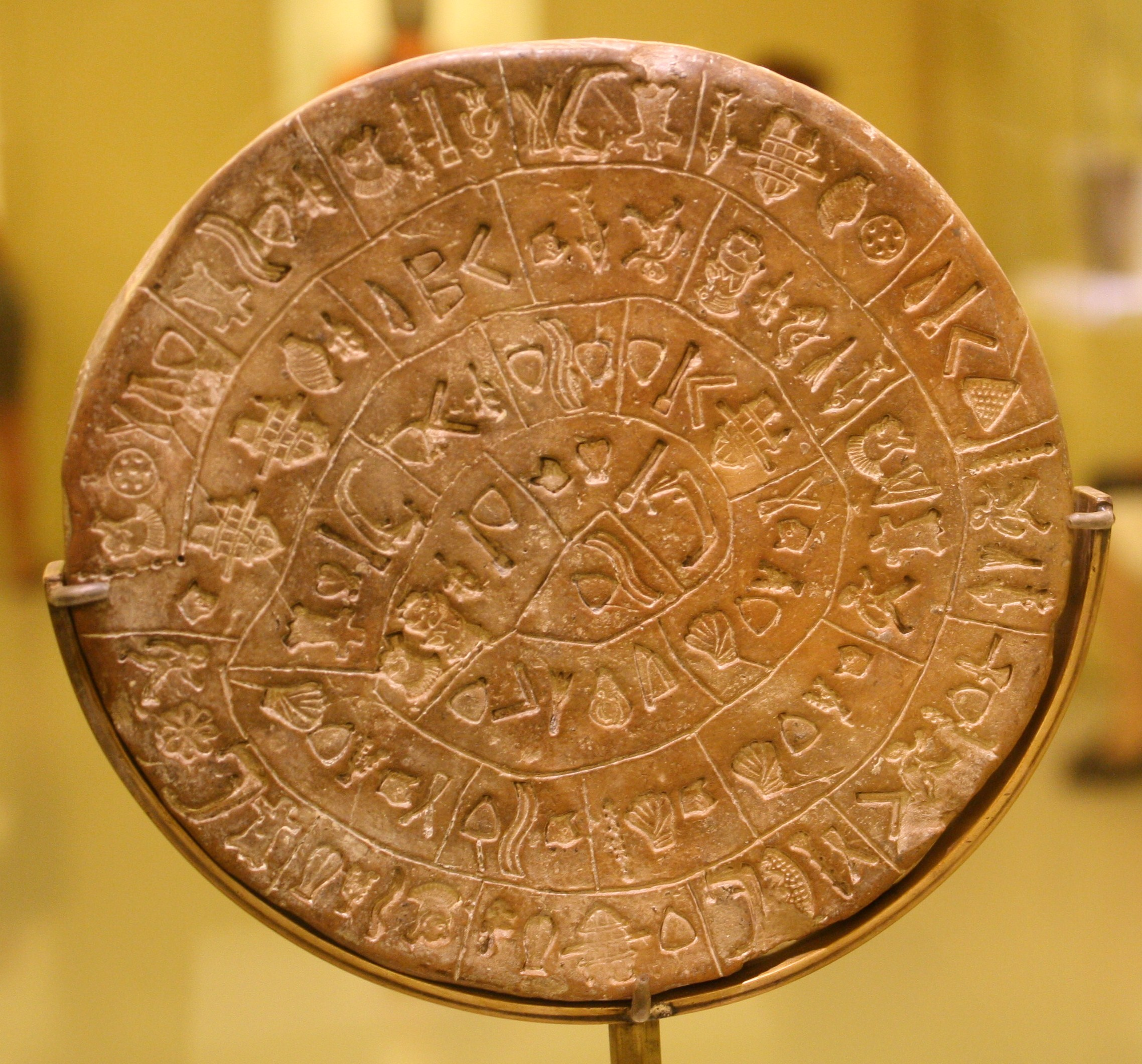 Le disque de Phaistos exposé au musée archéologique d'Héraklion en Crète, (Grèce). Face B.